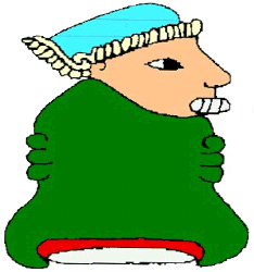 Glifo o escudo de armas de Zempoala